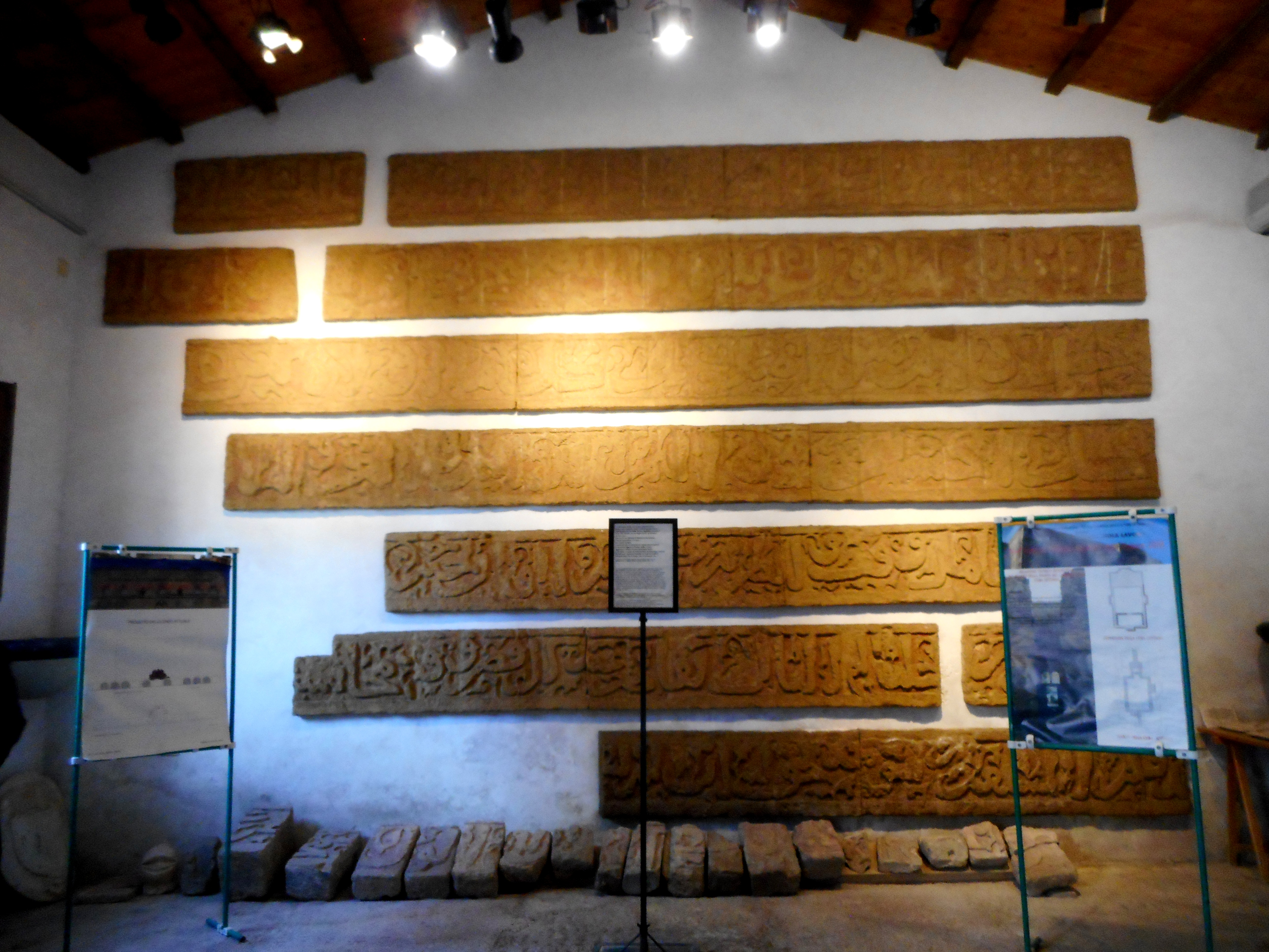 Epigrafe araba della Cuba esposta in una sala adiacente